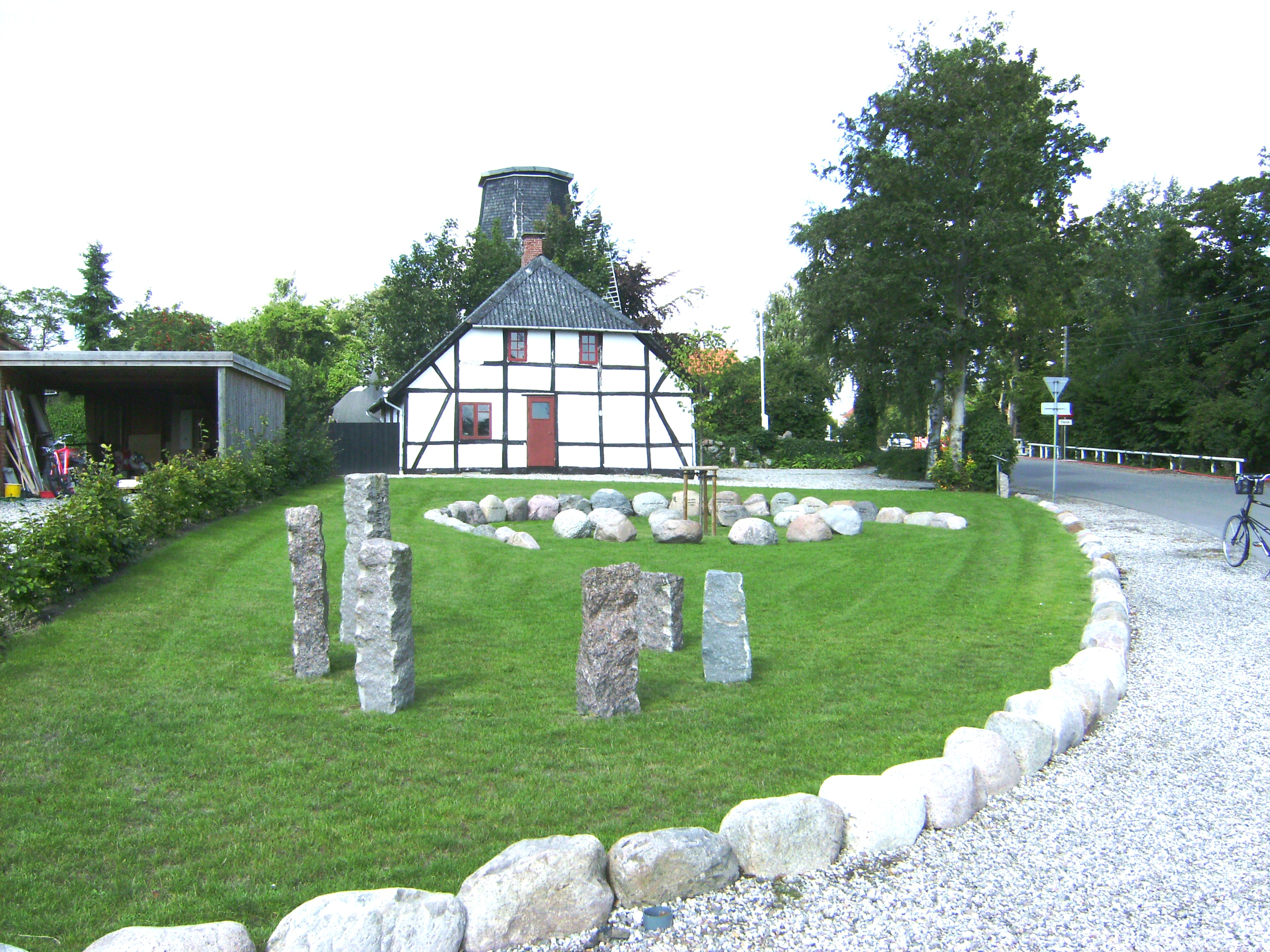 Moderne "tingsted" etableret af Kettinge Bylav 2006 - Outdood meeting place for the village society